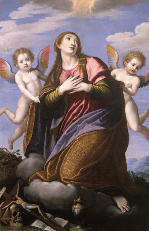 Santa María Magdalena en éxtasis, óleo sobre lienzo, Valladolid, Monasterio de las Descalzas Reales